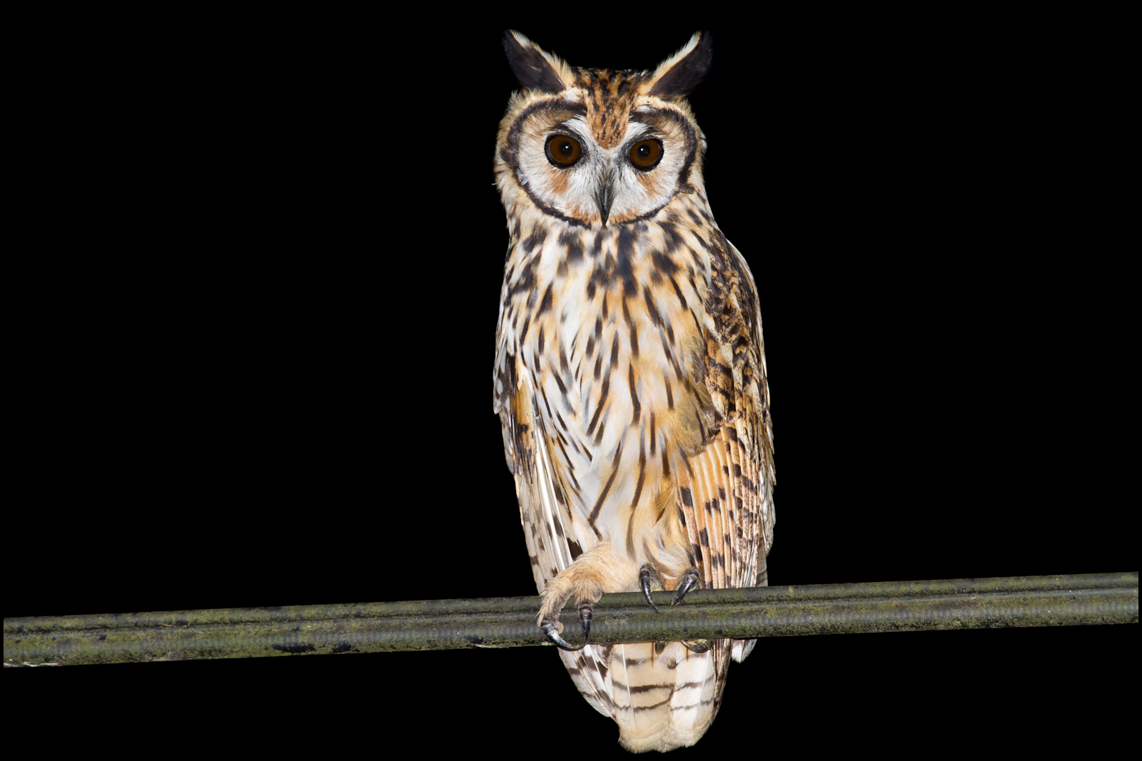 Bijagua, Costa Rica